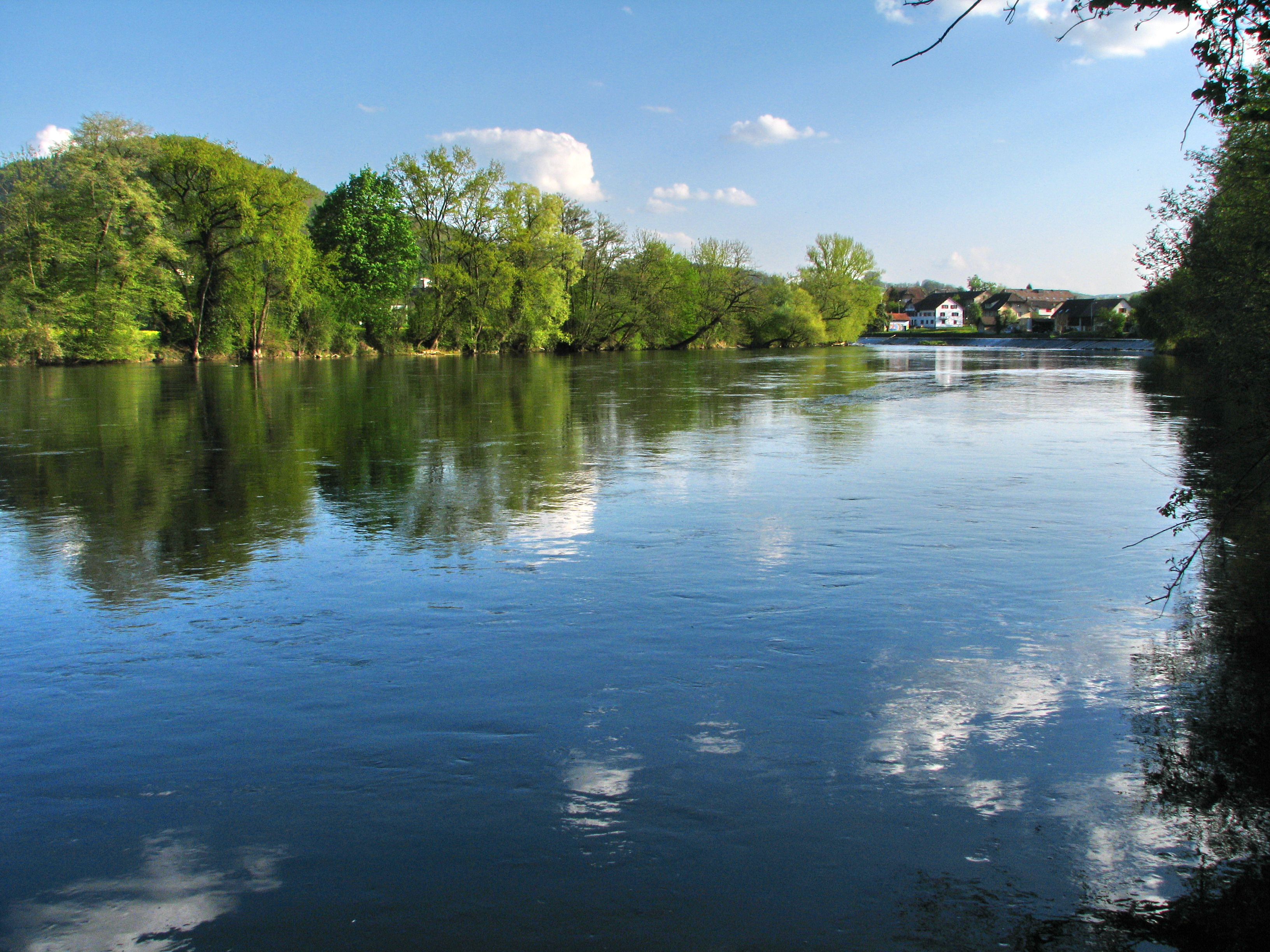 Limmat in Vogelsang (Gebenstorf)